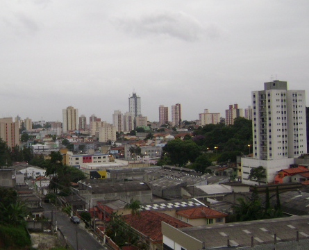 Esta imagem mostra uma vista parcial do centro de Diadema.